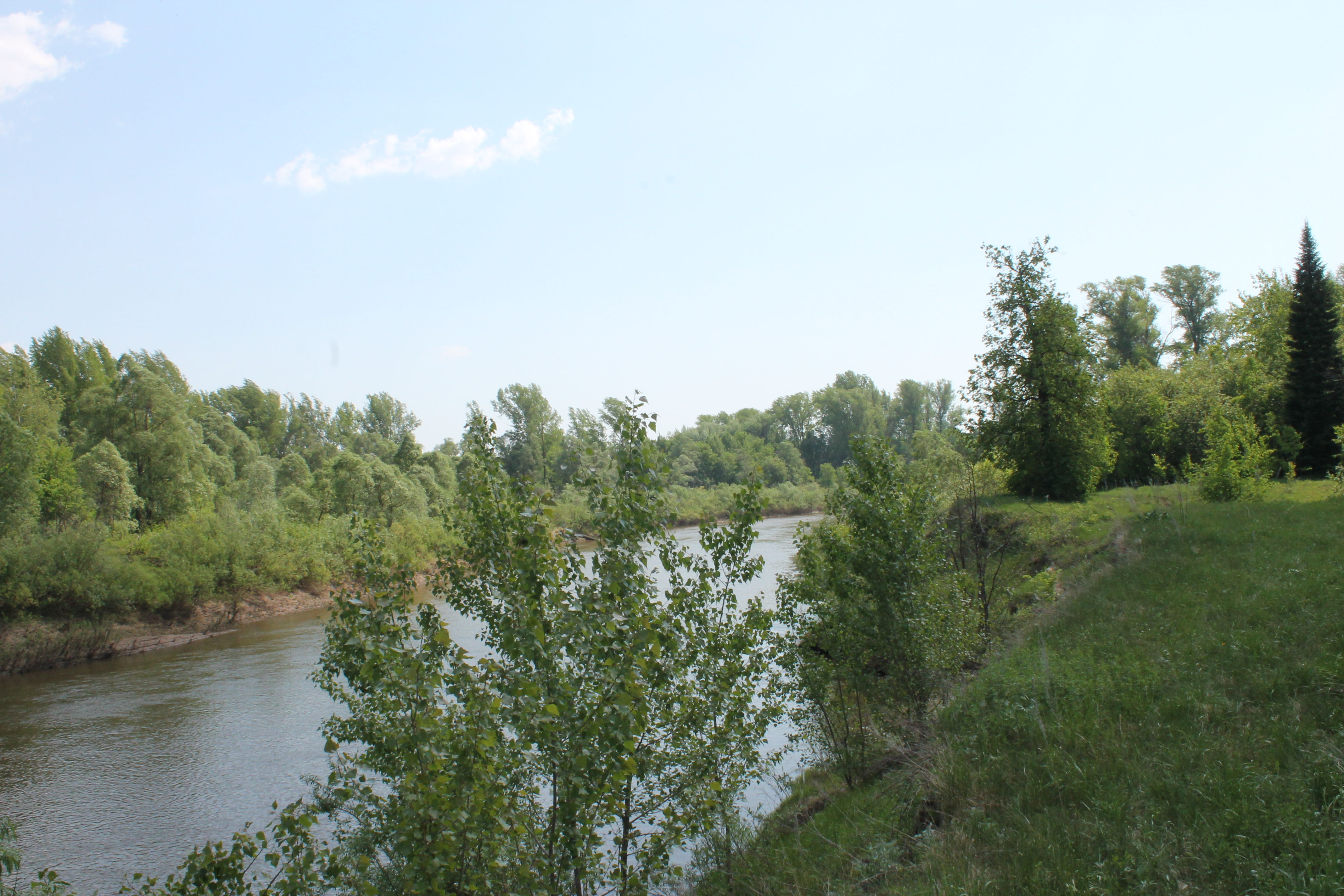 Река Быстрый Танып в Калтасинским районе Башкортостан